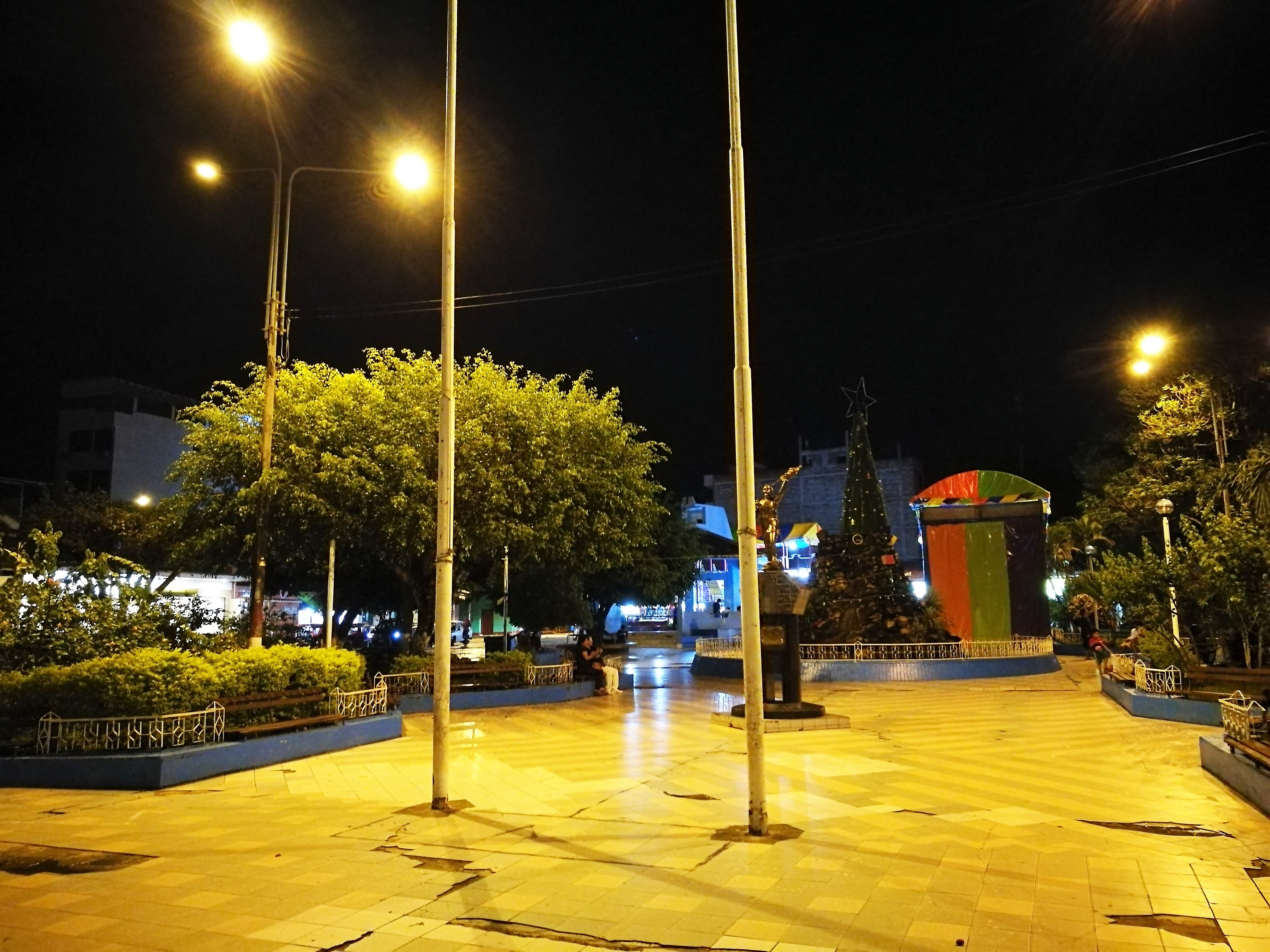 Plaza de Armas de Morales de nit